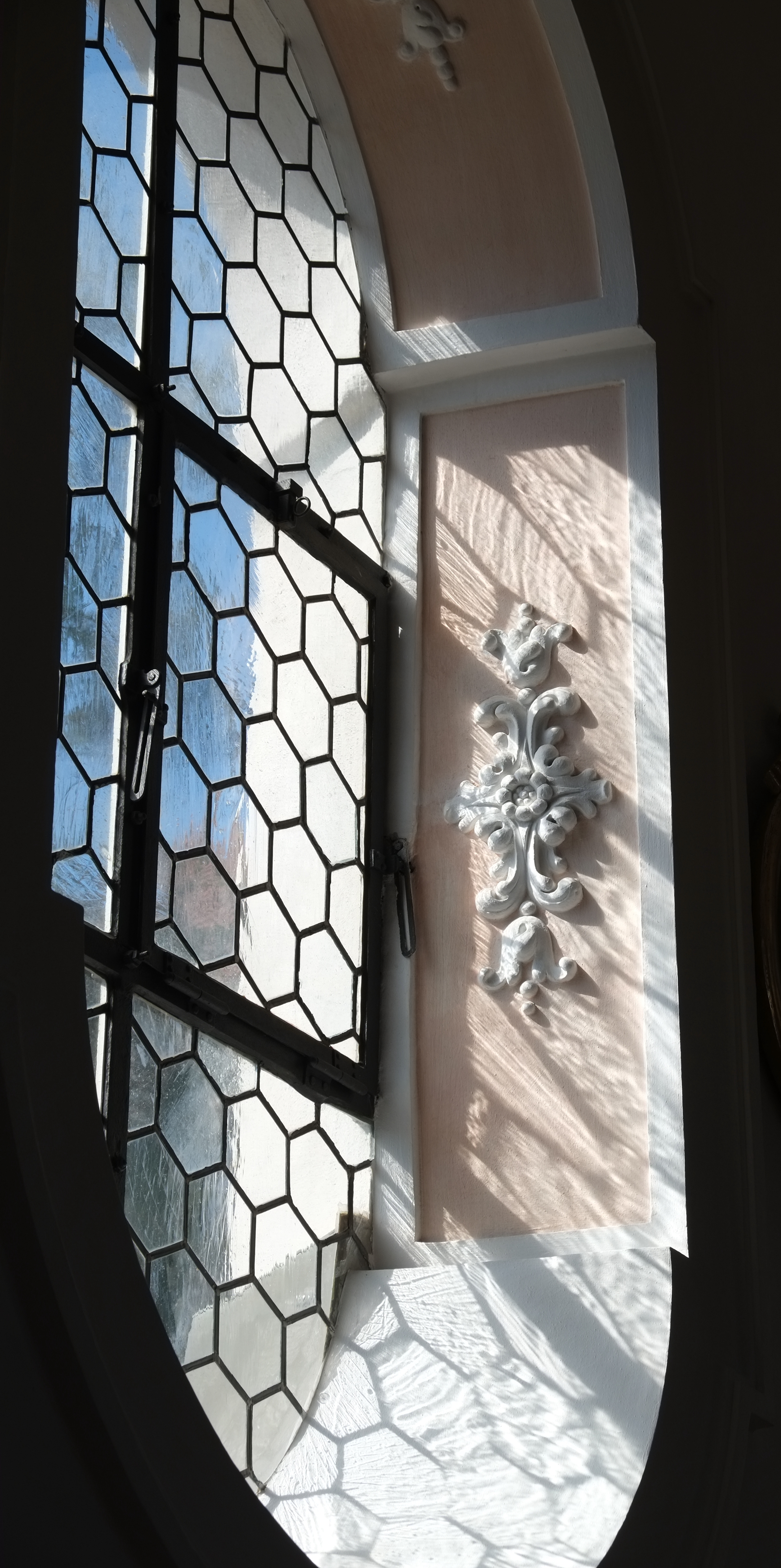 Kirche St. Stephan in Gallenbach, einem Stadtteil von Aichach im Landkreis Aichach-Friedberg (Bayern, Deutschland)